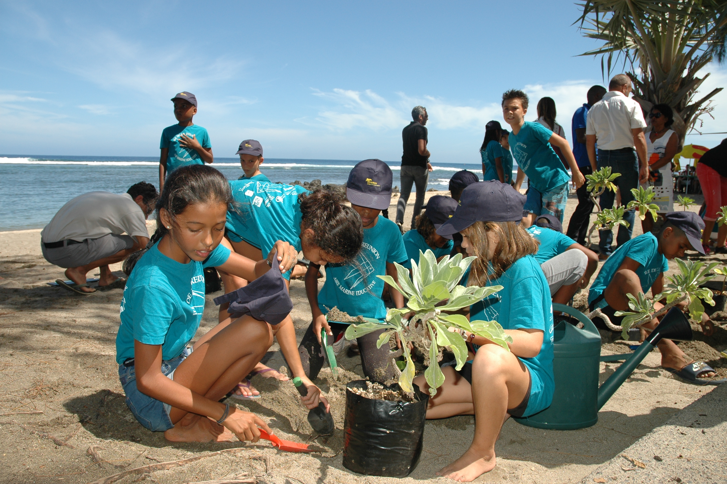 Opération de revégétalisation de la plage pour lutter contre l'érosion. Élèves de l'école de Saint-Leu.